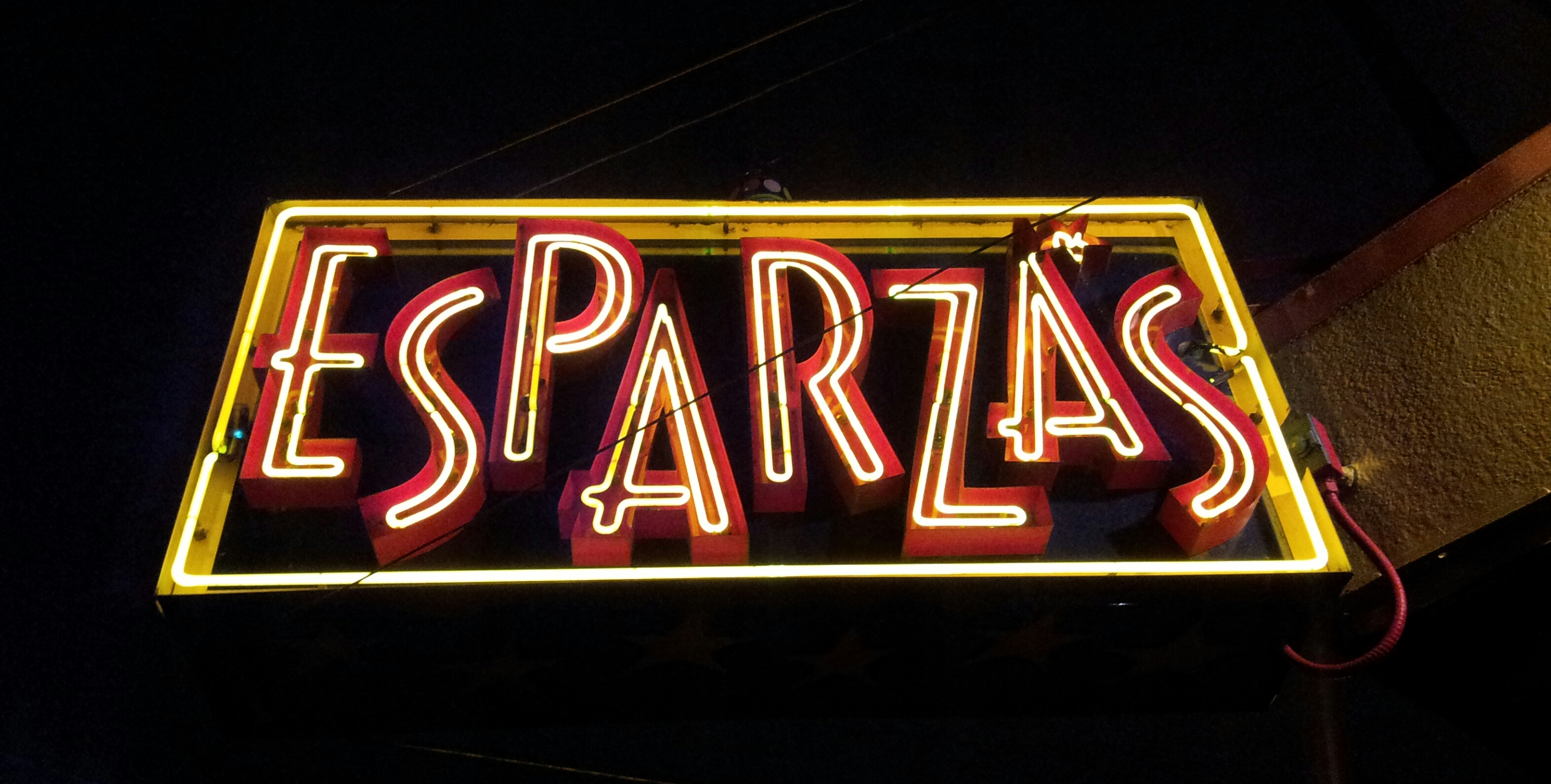 Esparza's sign, Portland, Oregon (2014)